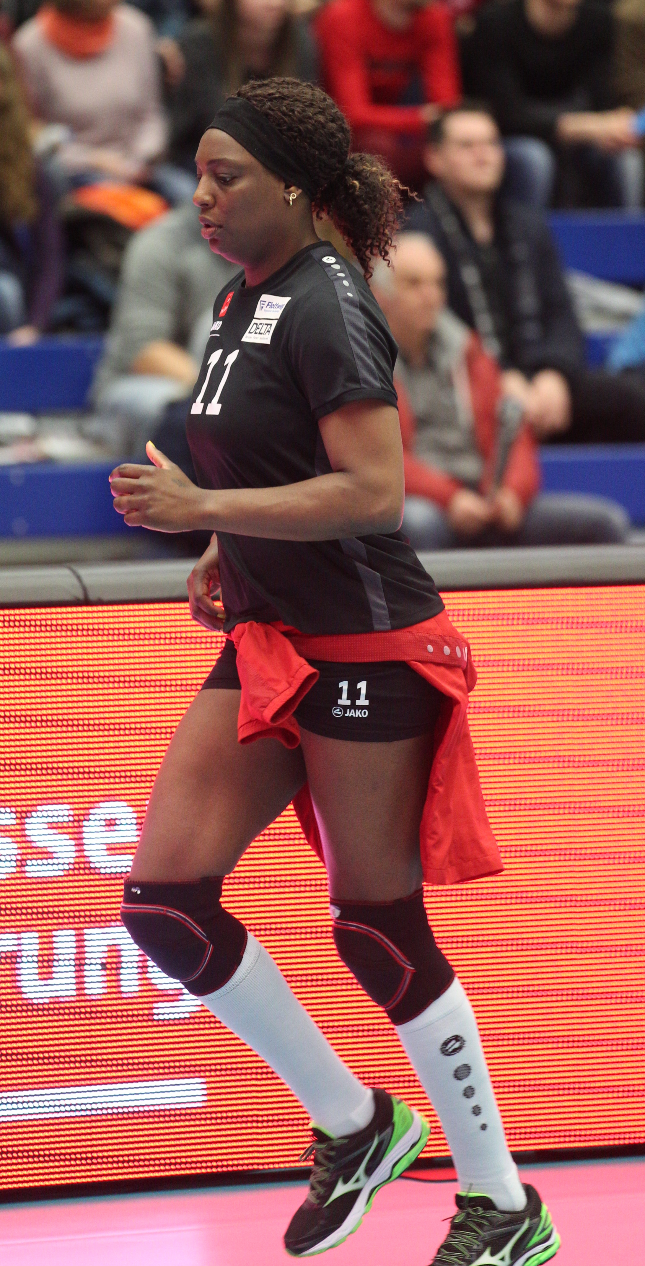 Liana Mesa Luaces beim Play-off-Viertelfinale Dresdner SC gegen Rote Raben Vilsbiburg, 18. März 2017